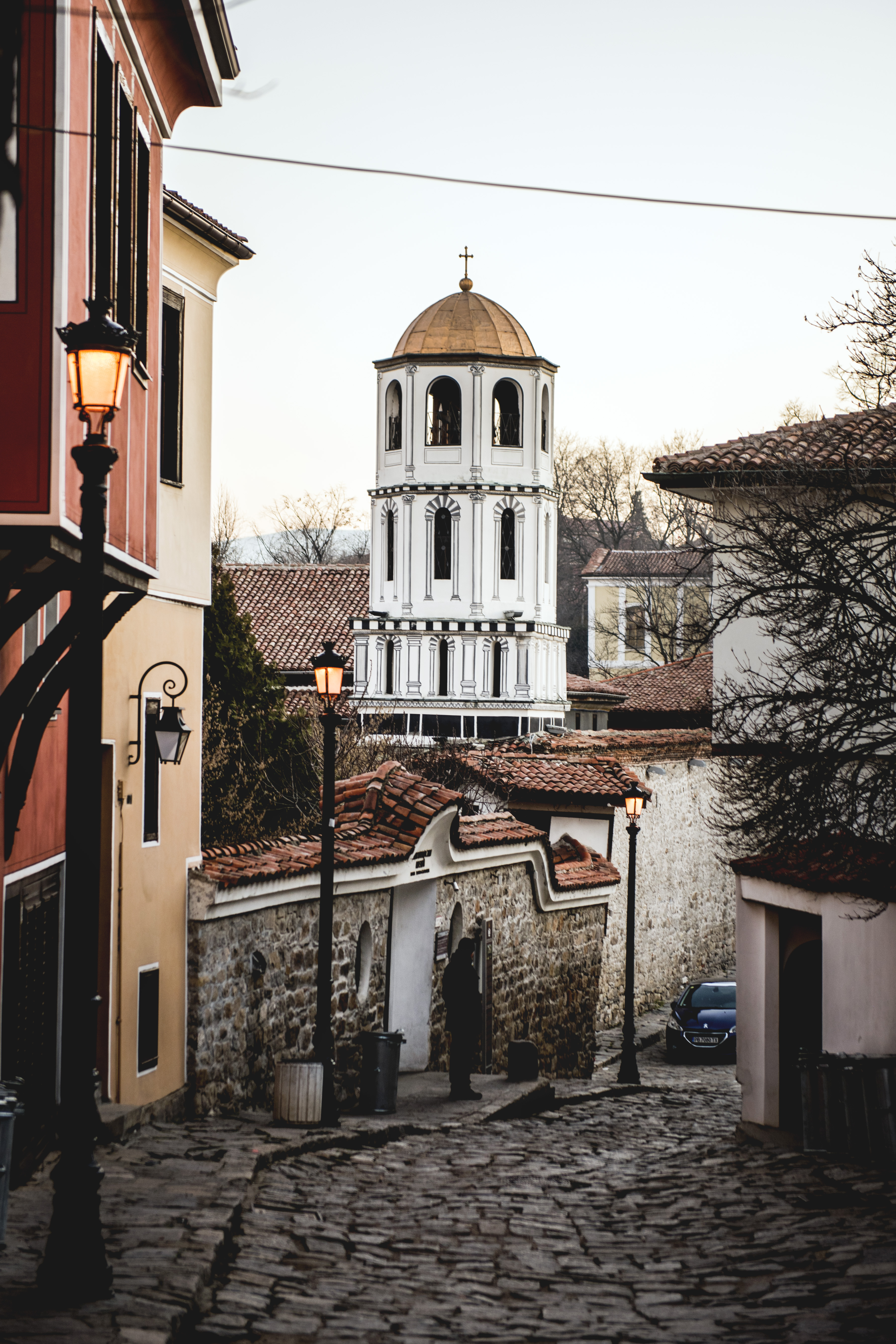 Камбанарията на църквата "Св. св. Константин и Елена" в град Пловдив. Църквата "Св. св. Константин и Елена" за пловдивчани е ценен религиозен, исторически и културен паметник в града на тепетата и един от най-посещаваните от туристите православен храм в Пловдив. Обявена в бр. 4 на Държавен вестник от 1995г е за архитектурен паметник.